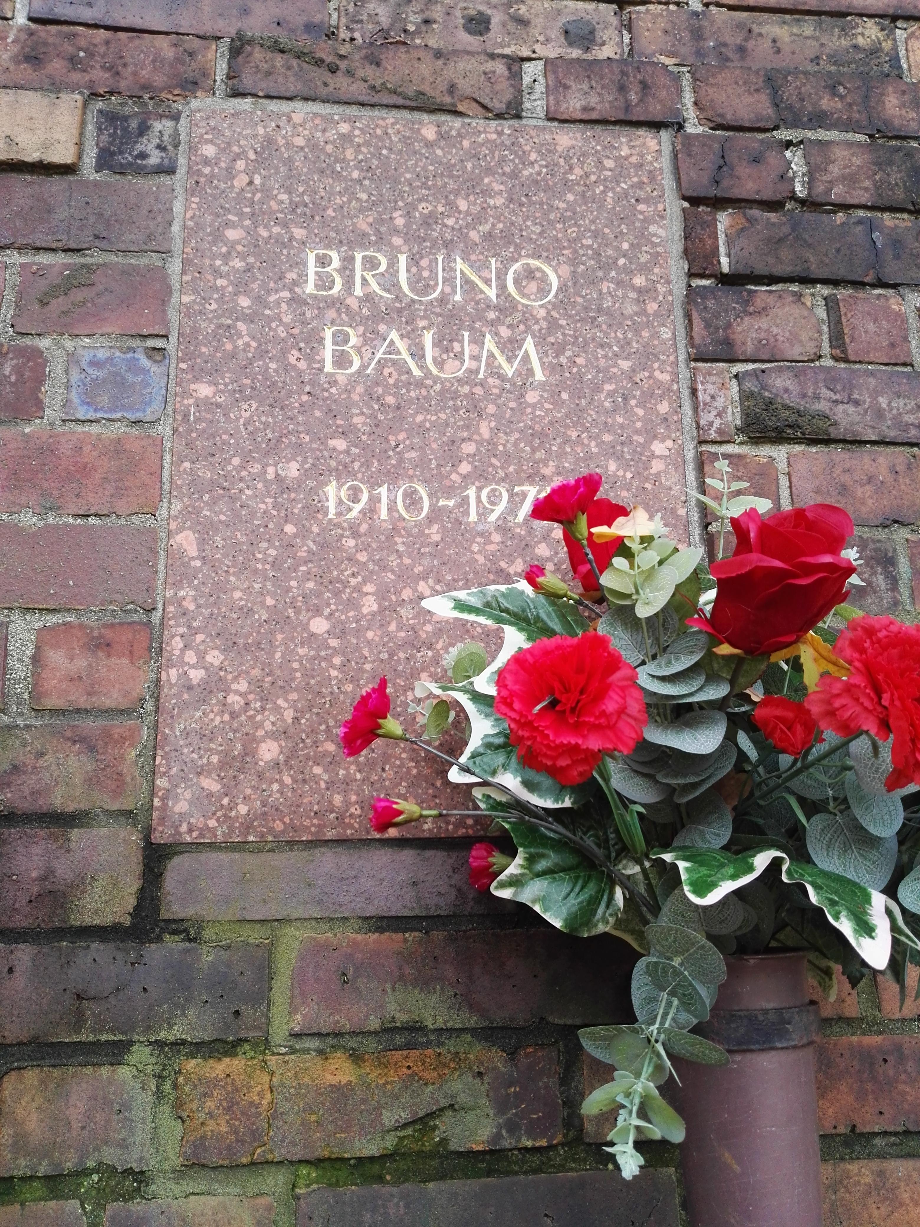 Grab von Bruno Baum in der Gedenkstätte der Sozialisten auf dem Zentralfriedhof Friedrichsfelde in Berlin-Lichtenberg